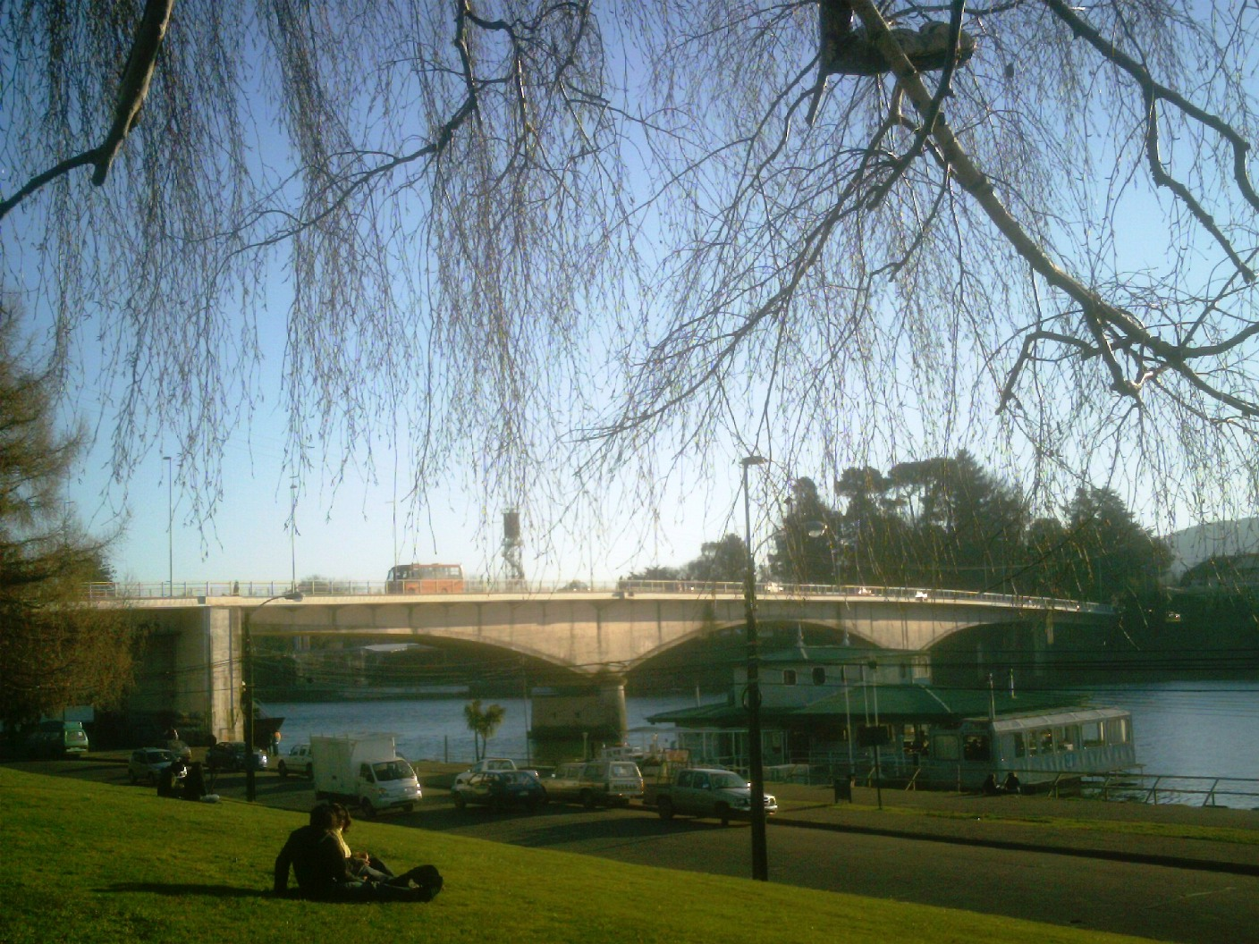 Puente Pedro de Valdivia, sobre el río Valdivia a su paso por la , Región de los Ríos, Chile